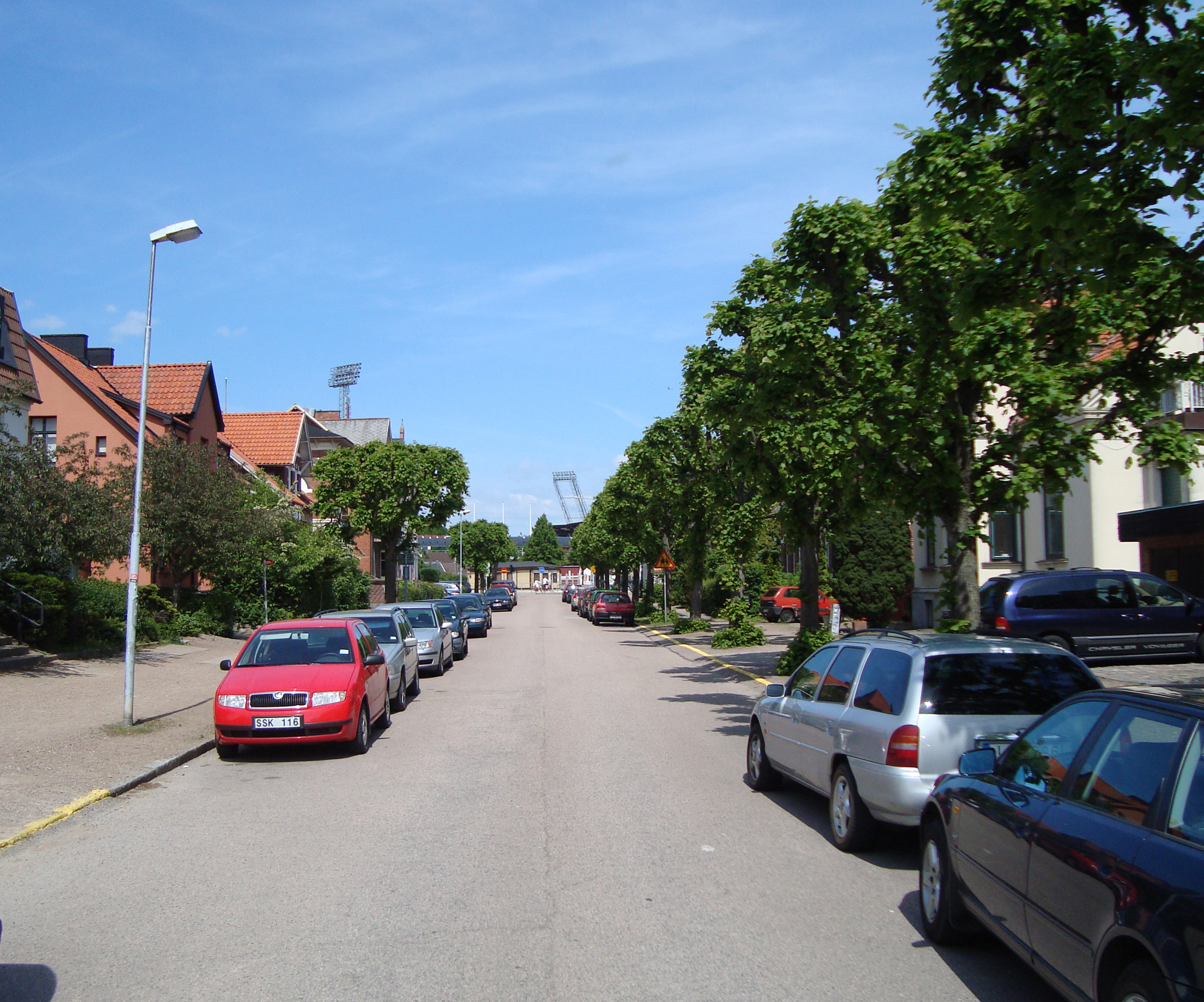 Olympiavägen i Helsingborg.